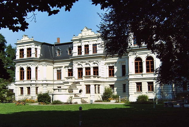 Villa im Amtsgarten Ottersleben, Magdeburg, Deutschland.